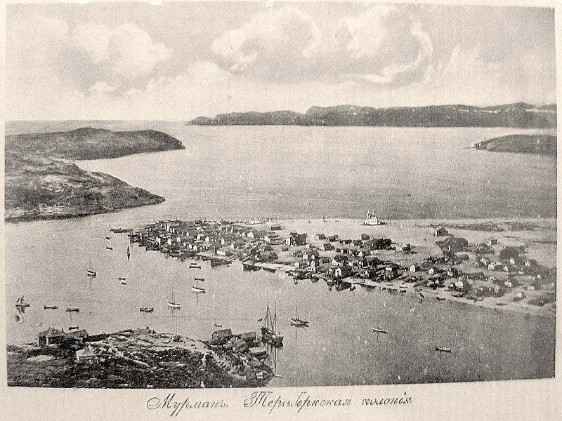 Мурман. Териберская колония